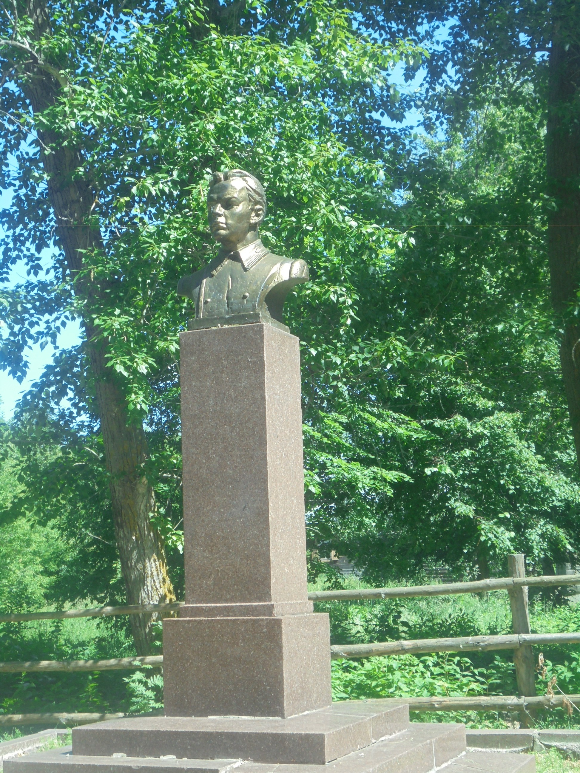 Бюст студента КГУ - молодого В.И.Ульянова-Ленина.Находится перед входом в музей-усадьбу Ульяновых - Бланк.